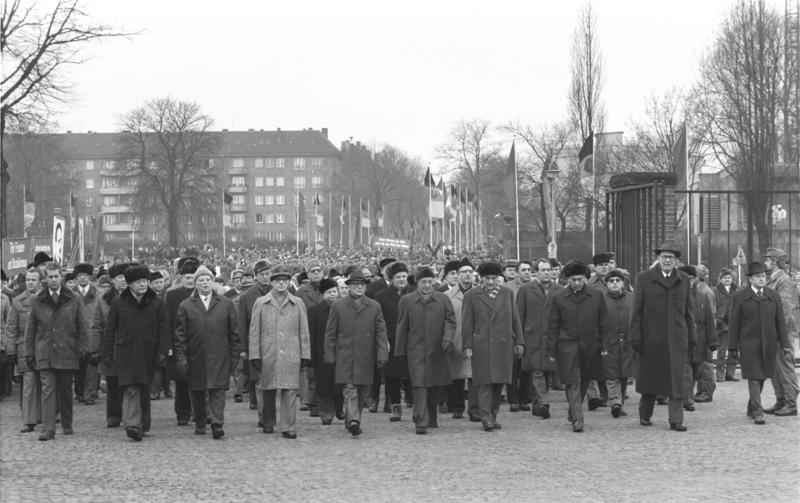 Berlin, Gedenken Liebknecht und Luxemburg ADN-ZB / Spremberg / 15.1.1978 Berlin: Kampfdemonstration Zehntausende Werktätige der DDR-Hauptstadt demonstrierten am 15.1.78 zu Ehren Rosa Luxemburgs und Karl Liebknechts zur Gedenkstätte der Sozialisten nach Berlin Friedrichsfelde. An ihrer Spitze schritten die Repräsentanten der Partei- und Staatsführung der DDR v.l.nr.: H. Tisch, K. Hager, W. Stoph, E. Honecker, H. Sindermann, P. Verner, K. Naumann und A. Neumann. [Harry Tisch, Kurt Hager, Willi Stoph, Erich Honecker, Horst Sindermann, Paul Verner, Konrad Naumann und Alfred Neumann] Abgebildete Personen: Tisch, Harry: Vorsitzender des FDGB-Bundesvorstands, Weltgewerkschaftsbund (WGB), Politbüro des ZK der SED, DDR Hager, Kurt: Mitglied des Politbüros des ZK der SED, Staatsratsmitglied, DDR (GND 119385511) Stoph, Willi: Ministerpräsident, Staatsratsvorsitzender, Armeegeneral, SED, DDR Honecker, Erich: Staatsratsvorsitzender, Generalsekretär des ZK der SED, DDR (GND 118553399) Sindermann, Horst: Volkskammerpräsident, stellvertretender Staatsratsvorsitzender, DDR Verner, Paul: Vorsitzender des Staatsrates, Sekretär des Zentralkomitees der SED, Präsident des Nationalrates der Nationalen Front, DDR Naumann, Konrad: 1. Sekretär Bezirksleitung Berlin der SED, Staatsratsmitglied, DDR Neumann, Alfred: Stellvertretender Ministerratsvorsitzender, Mitglied Politbüro ZK SED, DDR (GND 12009326X)